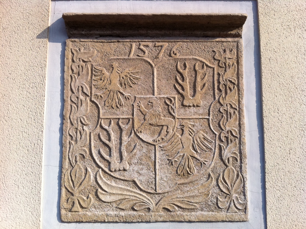 Das historische Wappen der Gemeinde Haßleben in Thüringen aus dem Jahre 1576. Zu finden am ehemaligen Gemeindebackhaus.